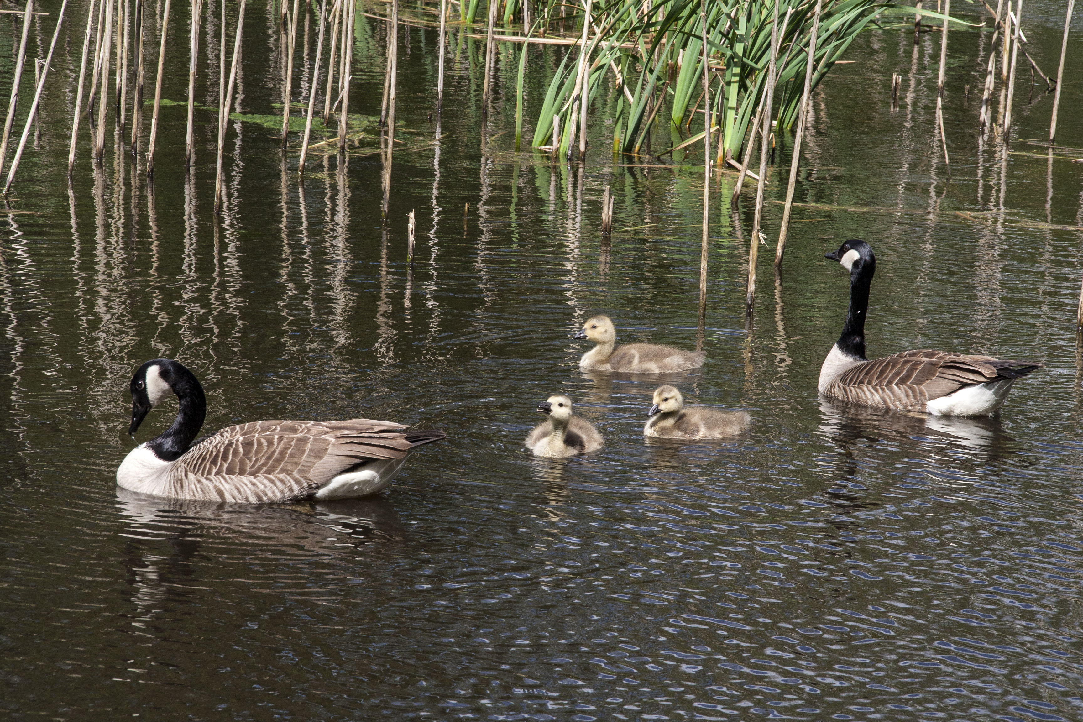 Gauchsbach, Feucht, Wendelstein